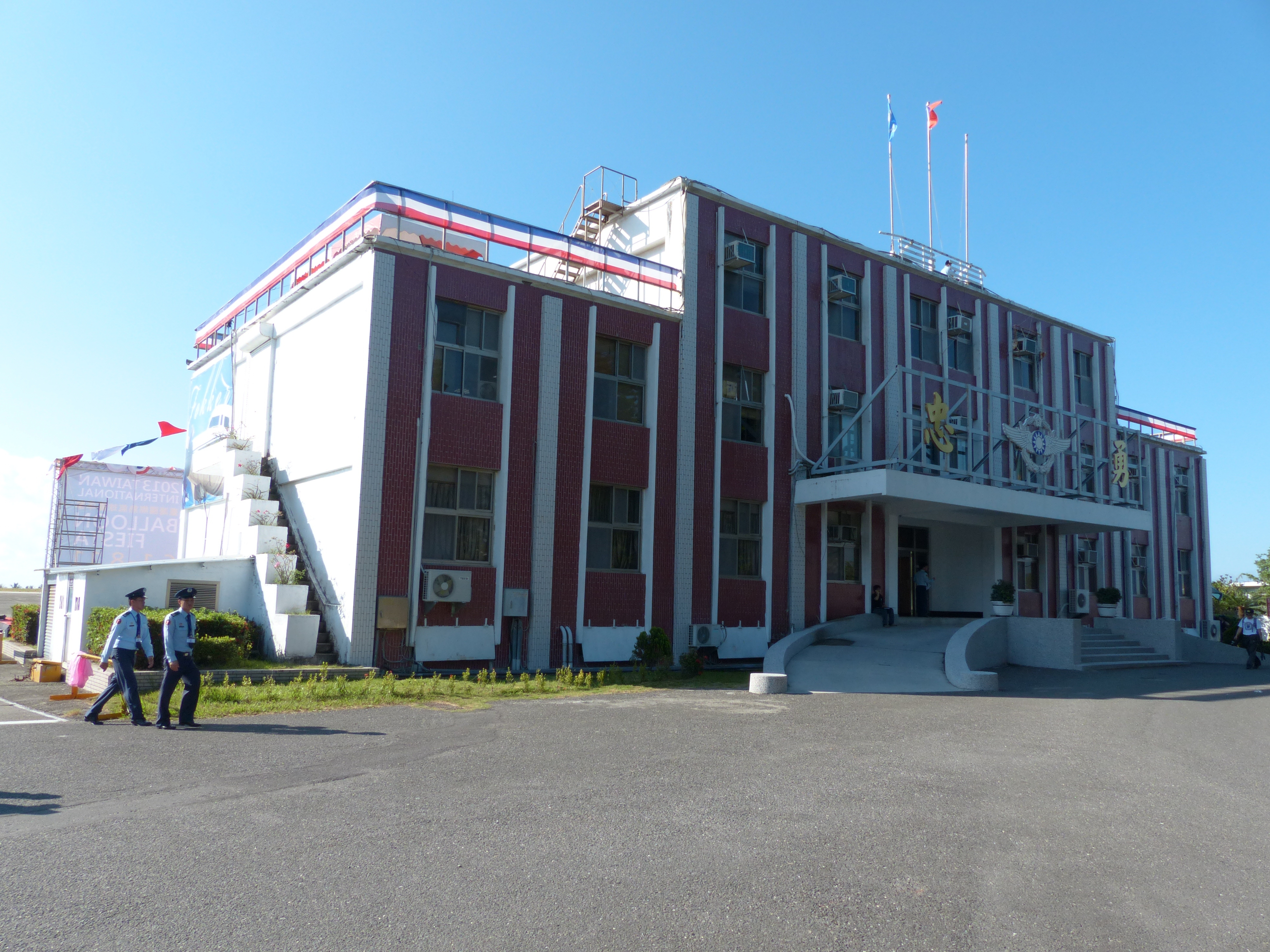 空軍志航基地737聯隊本部大樓。